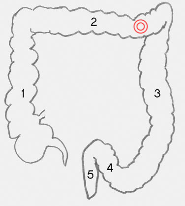 Beschreibung, Quelle und Lizenz Der Dickdarm hat verschiedene Teile (in Klammern die Zahlen im Schema): * aufsteigender Dickdarm (1) * querverlaufender Dickdarm (2) * absteigender Dickdarm (3) * Sigma (4) * Mastdarm und Anus (5). Die rote Markierung zeigt die ungefähre Lage des Cannon-Böhm-Punktes. Nach dem Bild Dickdarm-Schema.jpg des Benutzers Lange123 modifiziert. Licensing 22:38, 29. Okt 2005 Polarlys 376 x 418 (16358 Byte) (Der Dickdarm hat verschiedene Teile (in Klammern die Zahlen im Schema): * aufsteigender Dickdarm (1) * querverlaufender Dickdarm (2) * absteigender Dickdarm (3) * Sigma (4) * Mastdarm und Anus (5). Die rote Markierung zeigt die ungefähre Lage des [)